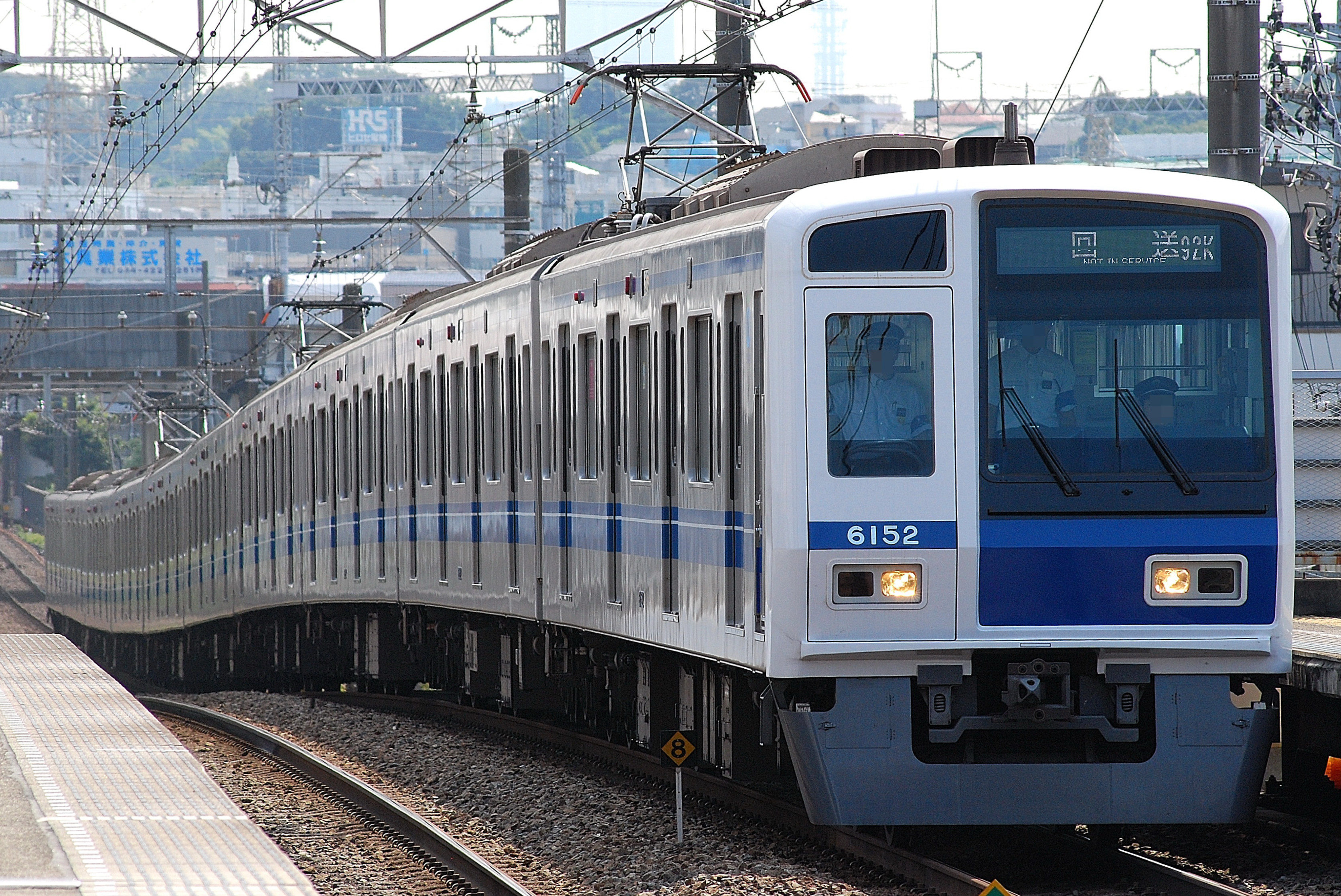 東急東横線で試運転を開始した、西武6000系50番台（大倉山）